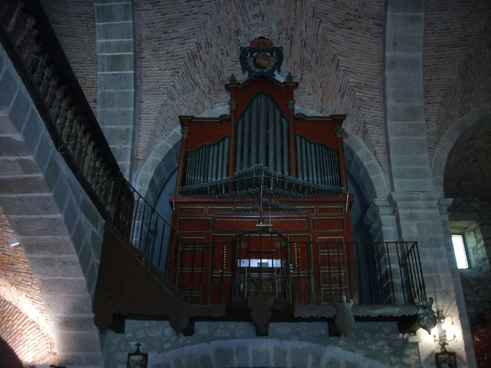 ORGANO CUACOS